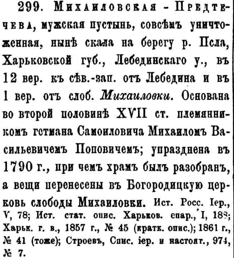 Стаття з книги Зверинского В. В. Преобразование старых и учреждение новых монастырей с 1764-65 по 1 июля 1890 год